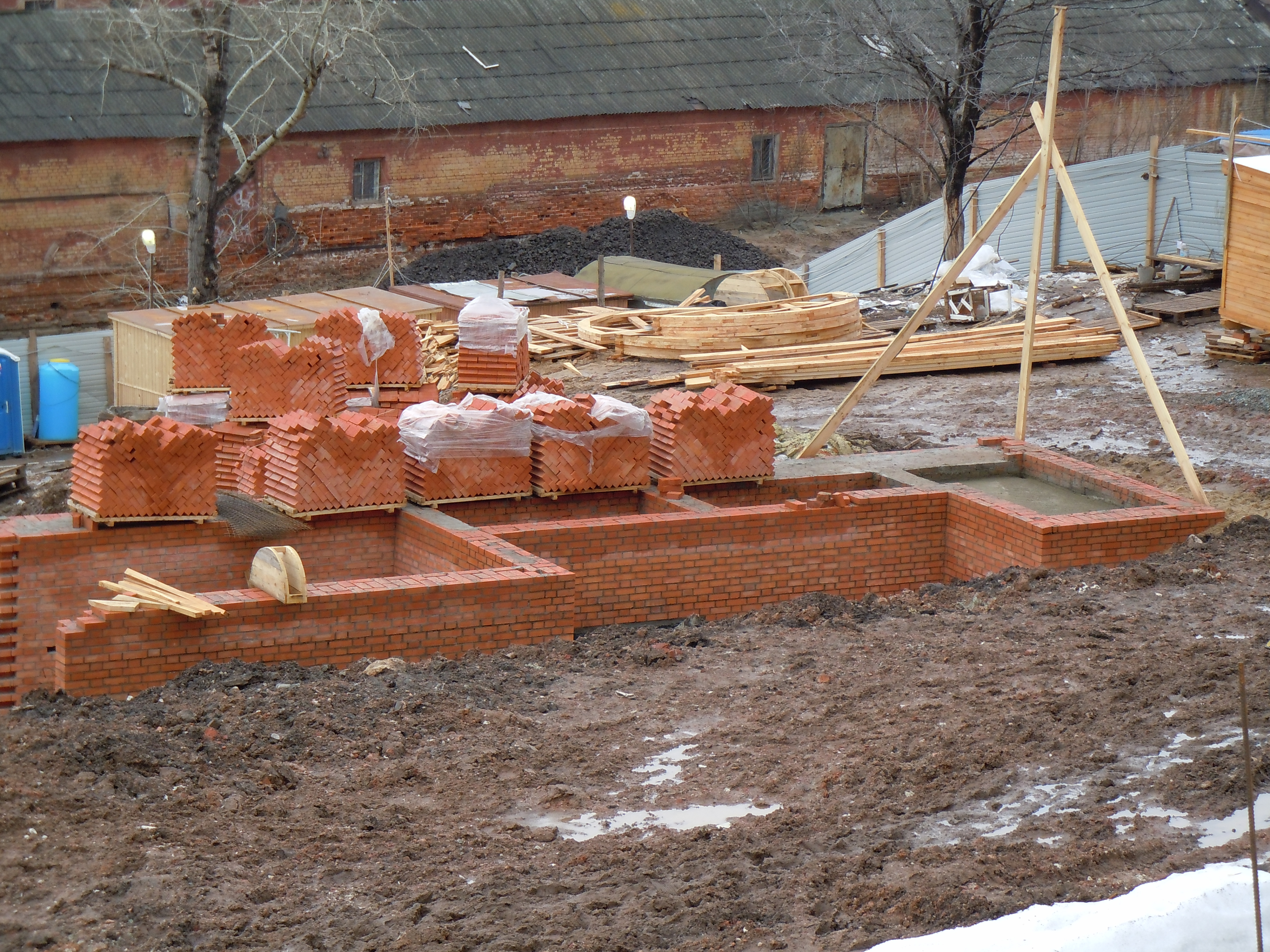 Реконструкция Зачатской башни.